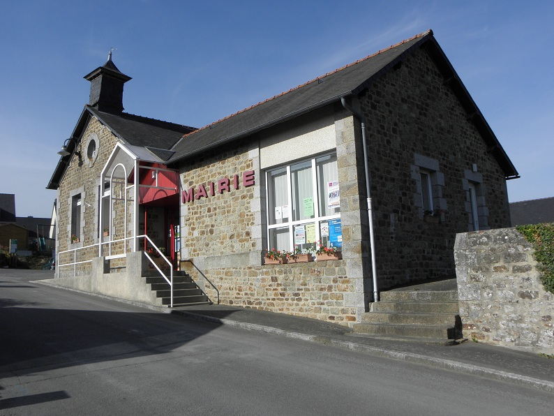 Mairie de Saint-Marc-sur-Couesnon (35).